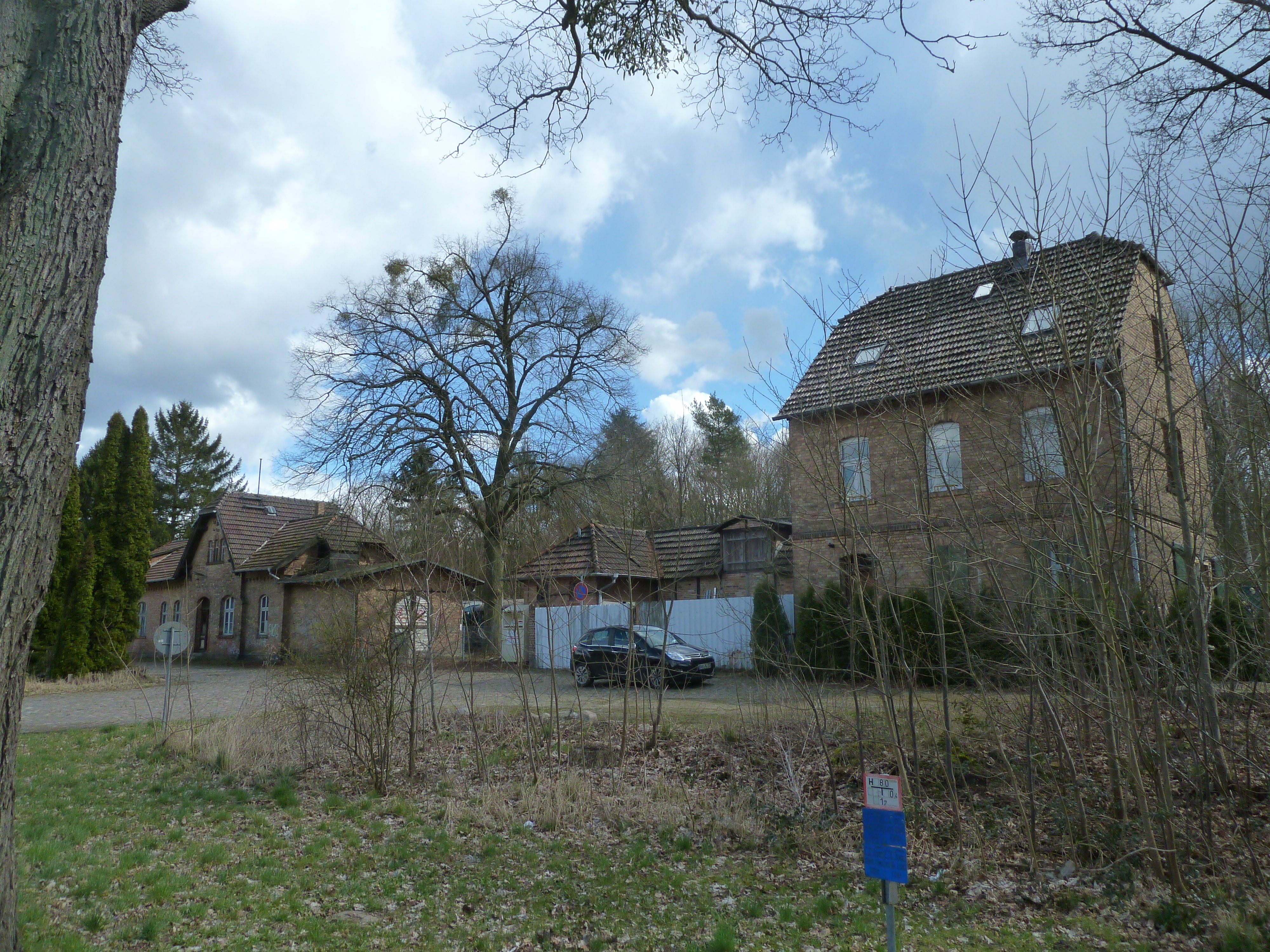 Denkmalgeschützter ehemaliger Bahnhof Tiefensee an der Wriezener Bahn nordöstlich von Berlin, Ansicht des Ensembles aus Richtung Westen